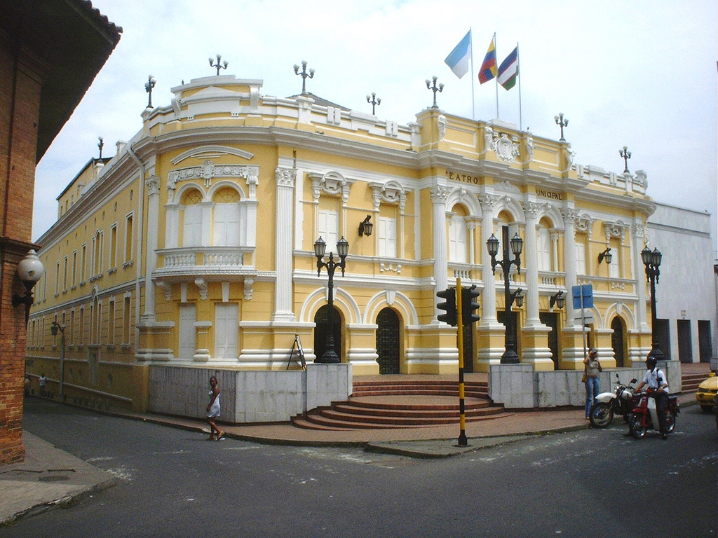 Tomada por Augusto Ilian